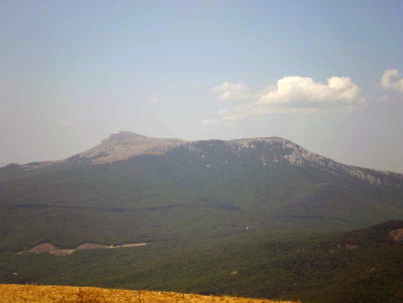 Чатир-даг. Еклізі-Бурун (ліворуч). Панорама з Демерджі